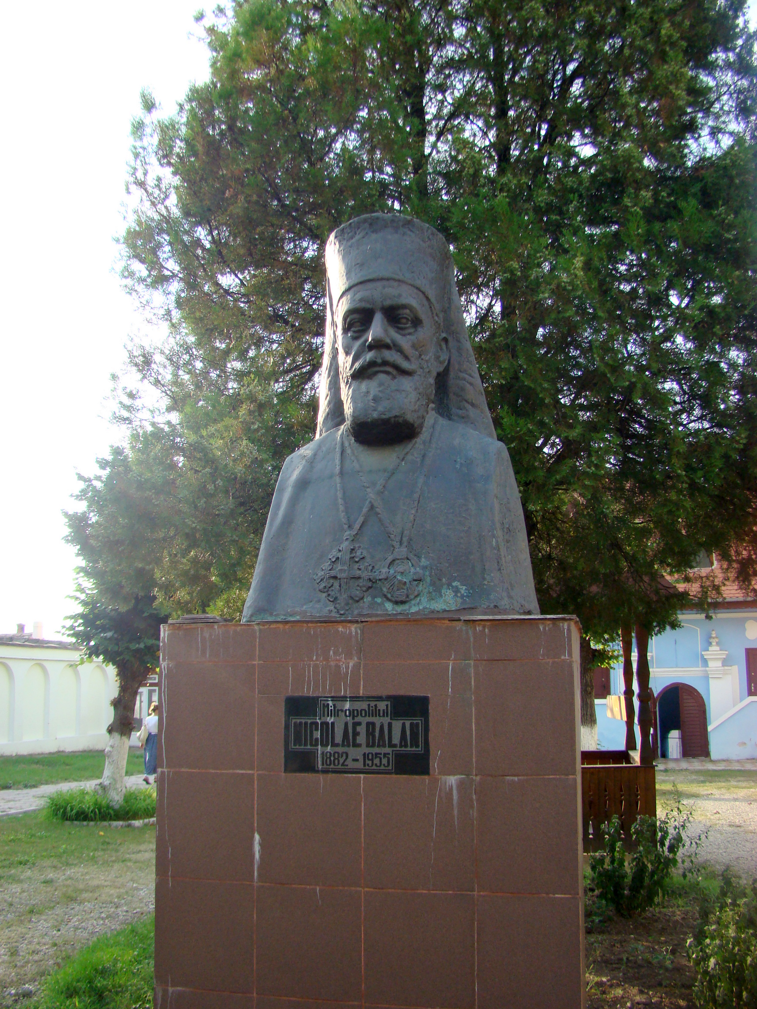 Bustul mitropolitului Nicolae Bălan din incinta Arhirpiscopiei Sibiului